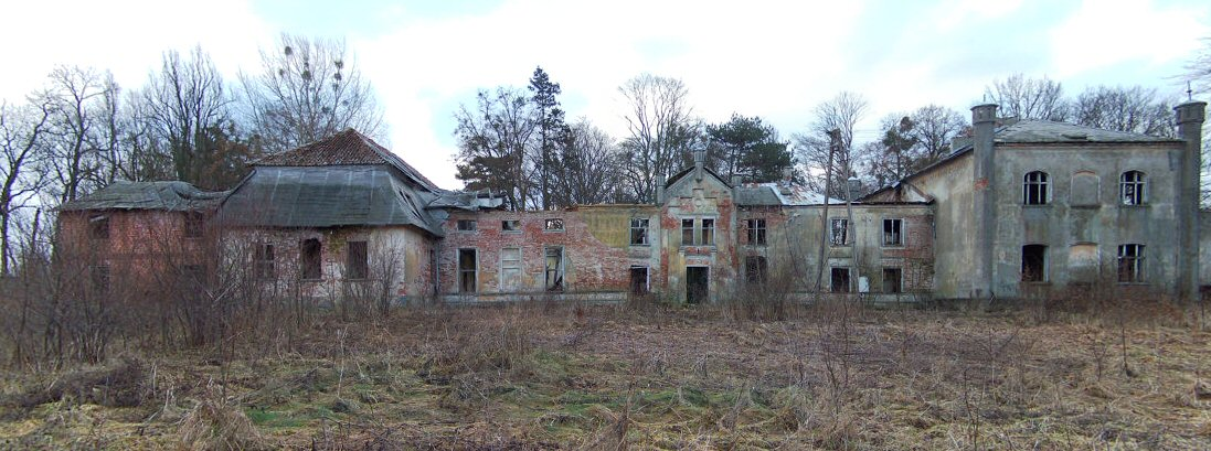 Pałac w Barzynie. 02.1968.